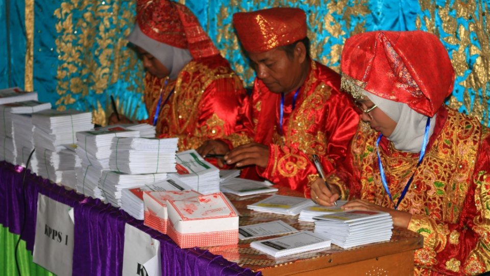 Suara Sumbar Selalu Bulat dari Pilpres ke Pilpres